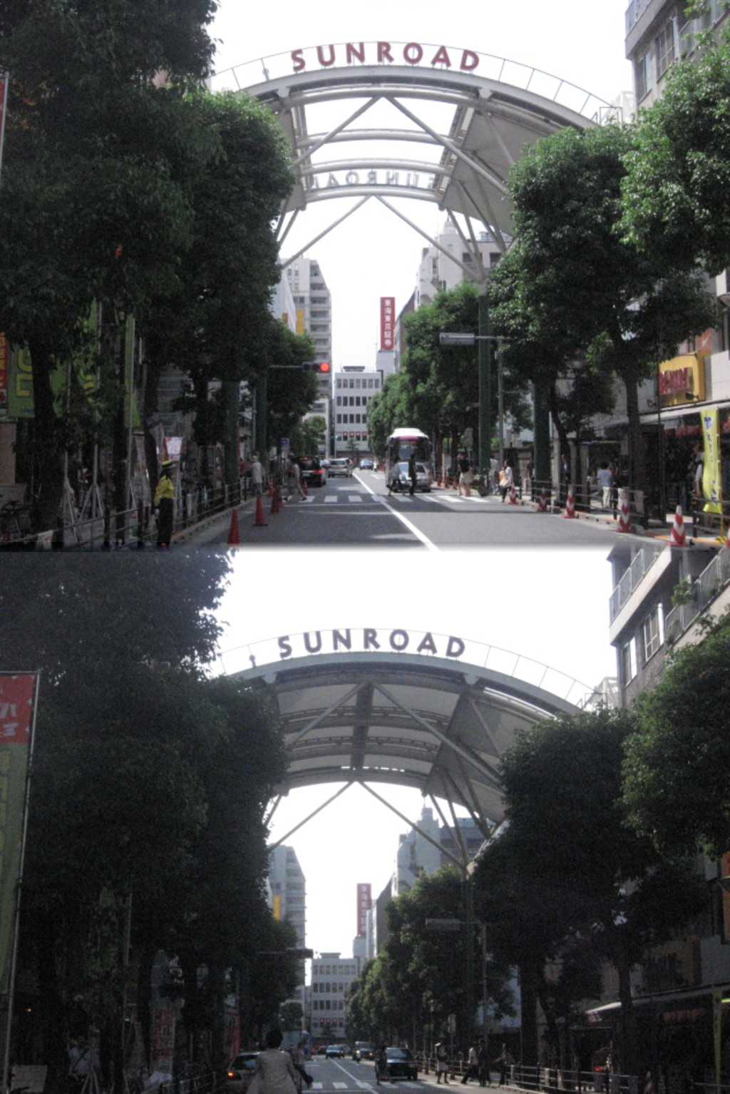 東京都武蔵野市『吉祥寺サンロード商店街』本町新道中央ゲート